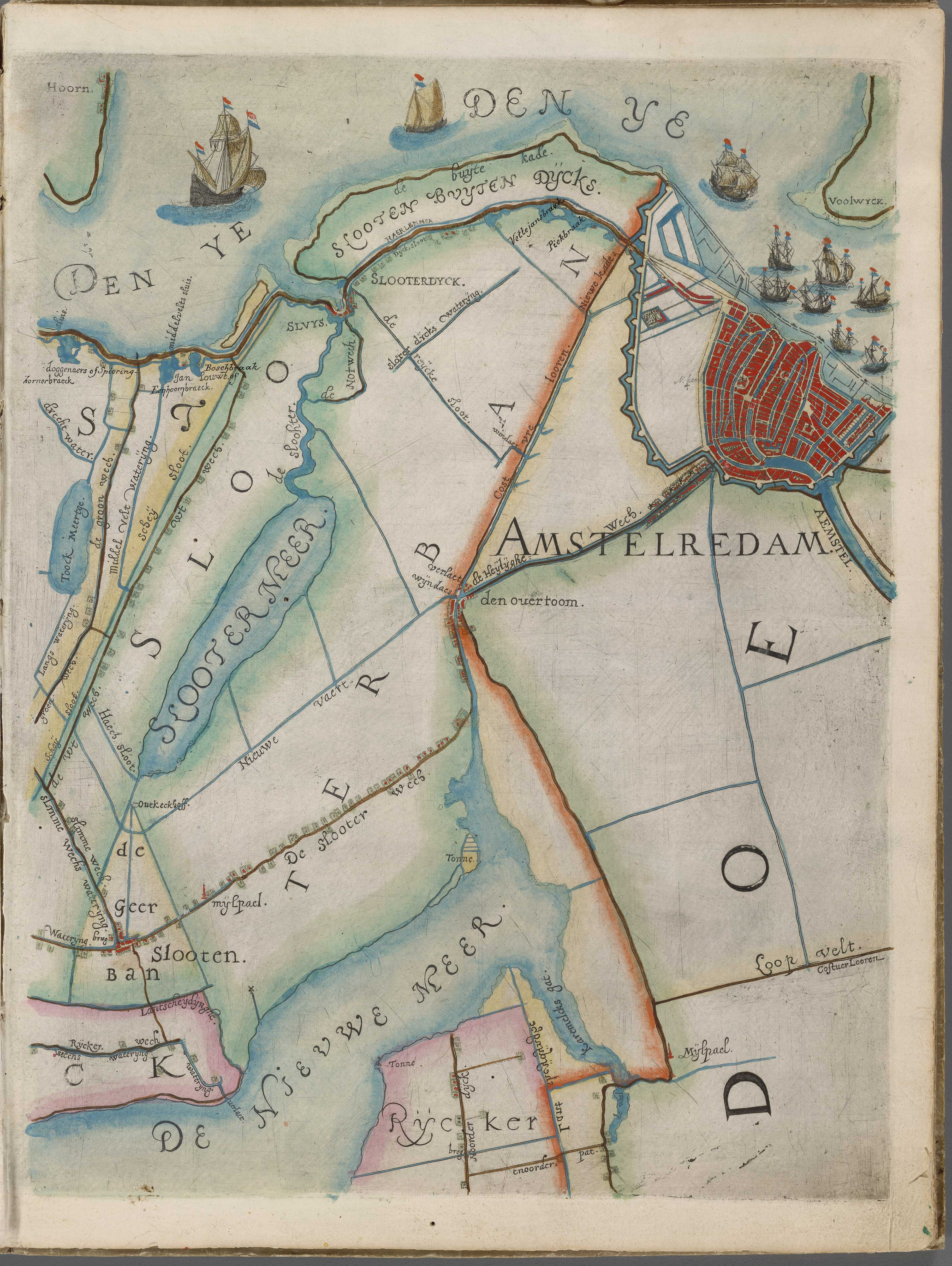 Kaart van het hoogheemraadschap van Rijnland : Amsterdam, 1615. - Floris Balthasars vervaardigde deze overzichtskaart samen met zijn zoon Balthasar Florisz. van Berckenrode, in opdracht van dijkgraaf en hoogheemraden van Rijnland. De basis hiervoor waren de manuscriptkaarten van alle ambachten binnen Rijnland. Vanaf deze manuscriptkaarten graveerde Balthasars het hoogheemraadschap in twintig koperplaten. In 1614 verleende de Staten-Generaal hem octrooi op deze kaart voor de eerstvolgende tien jaren. - Dit kaartblad geeft weer Amsterdam en omgeving